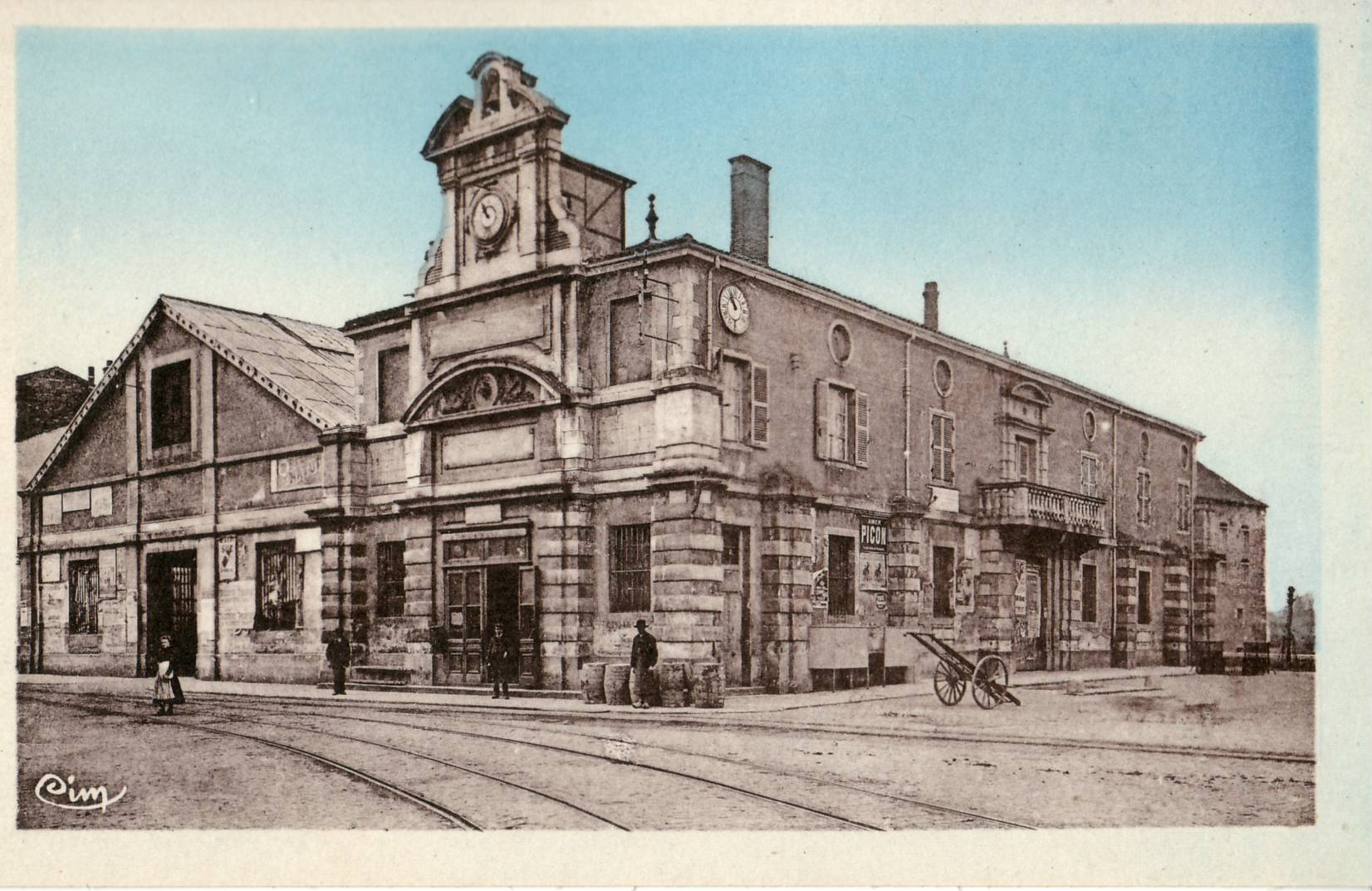 Carte postale ancienne éditée par CIM : PONT-DE-VAUX - La Gare et les Halles